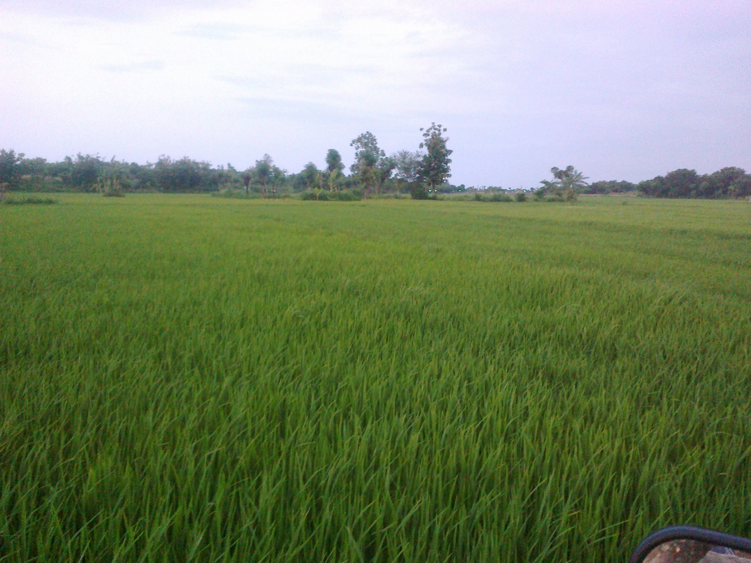 Talun Tengah adalah sebuah kebun kecil di tengah pesawahan